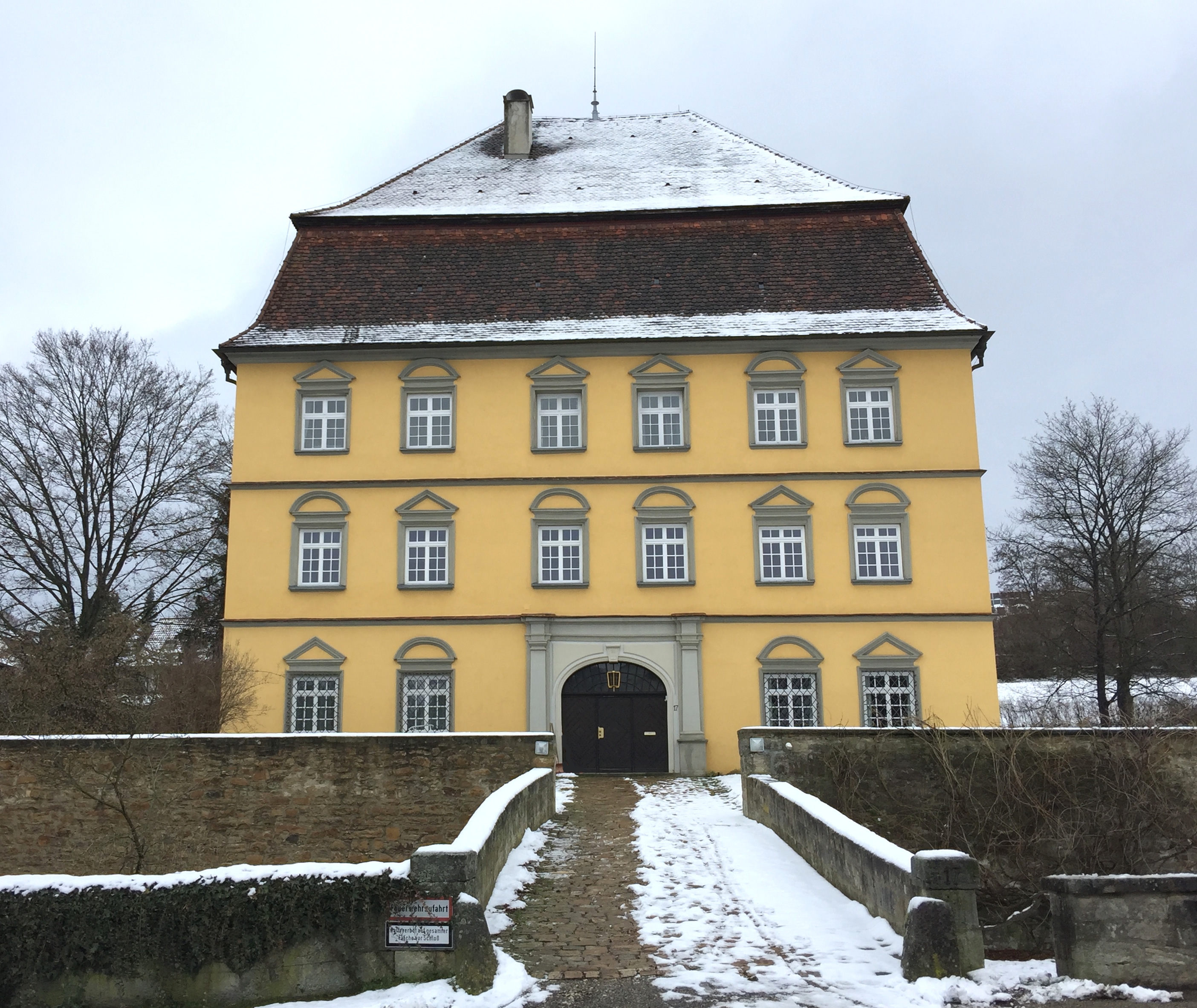 Schlossanlage mit Parkanlage aus dem 18. Jh., in Wernau, Baden-Württemberg, Kreis Esslingen. Lage: Hauptstrasse 17/21